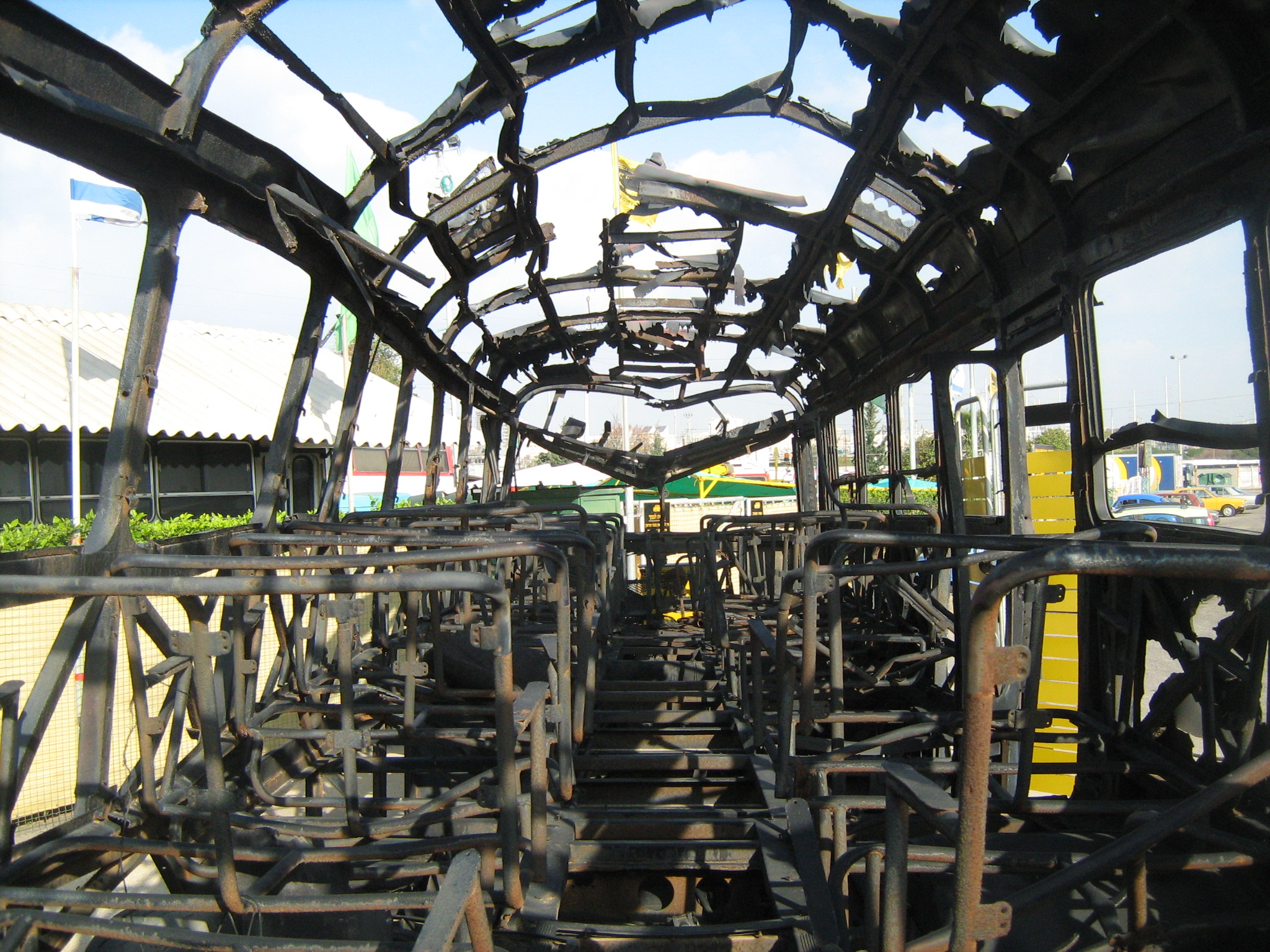 מוזיאון אגד בחולון